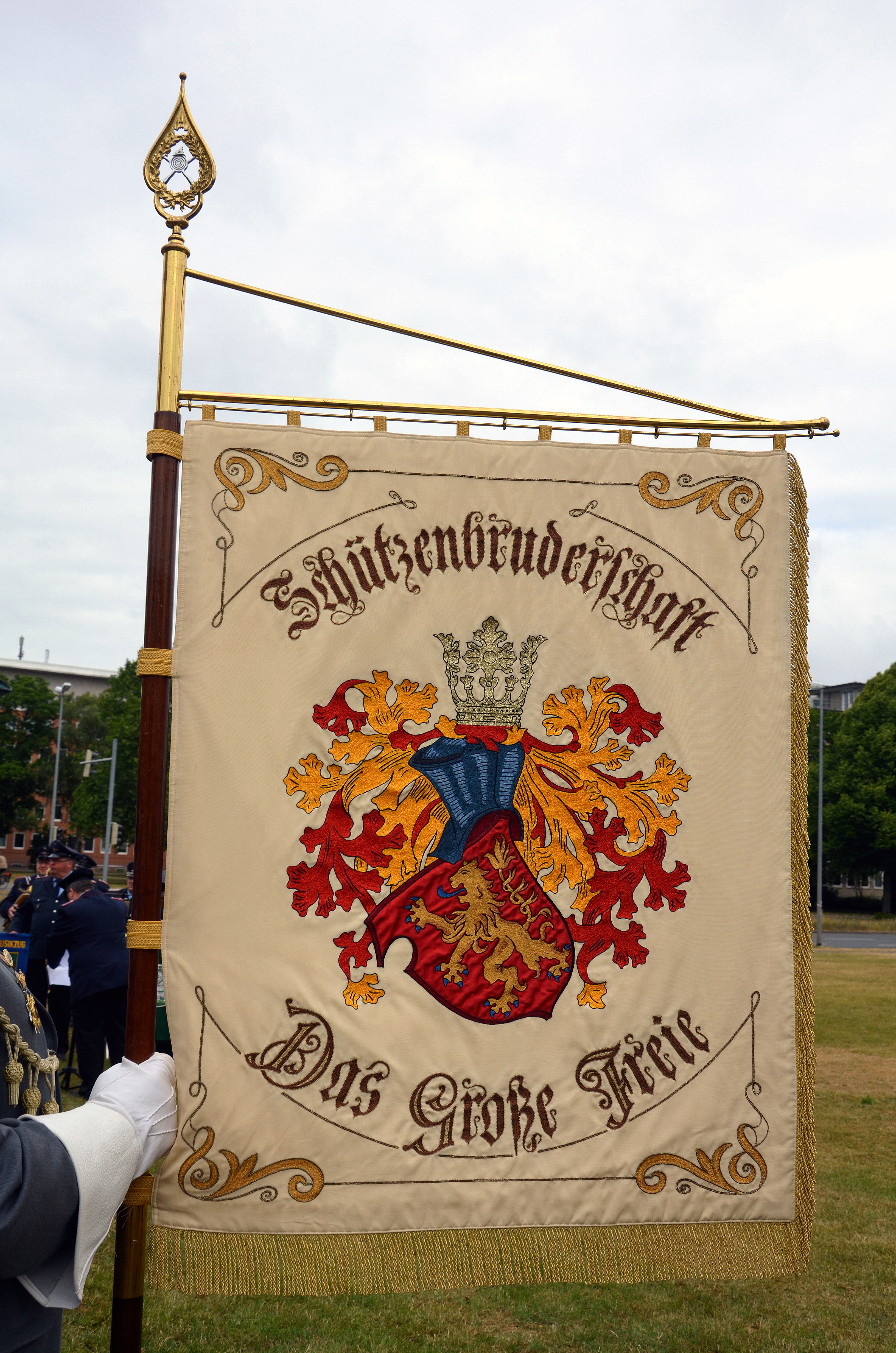 Zur 200sten Wiederkehr der Schlacht bei Waterloo (18. Juni 1815) hatte der Welfenbund e.V. gemeinsam mit Royal British Legion Hannover Branch e.V. zu einer Gedenkveranstaltung am 20. Juni 2015 an der Waterloosäule auf dem Waterlooplatz in Hannover geladen. An der Feierlichkeit mit Kranzniederlegung und musikalischer Umrahmung nahmen unter anderem auch Vertreter der Royal Scots Dragoon Guards teil, ferner die Schützenbruderschaft Das große Freie, die Freiwillige Feuerwehr Barfelde, Spielleute vom Musikzug der Freiwilligen Feuerwehr Bethel und Rheden sowie Vertreter der Loge Wilhelm zur Deutschen Treue ...